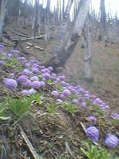 नेपाली: नेपालको हुम्ला जिल्लामा पाइने एक प्रकारको जंगली फूल स्थानिय भाषामा यसलाई डोइली फूल भनिन्छ ।